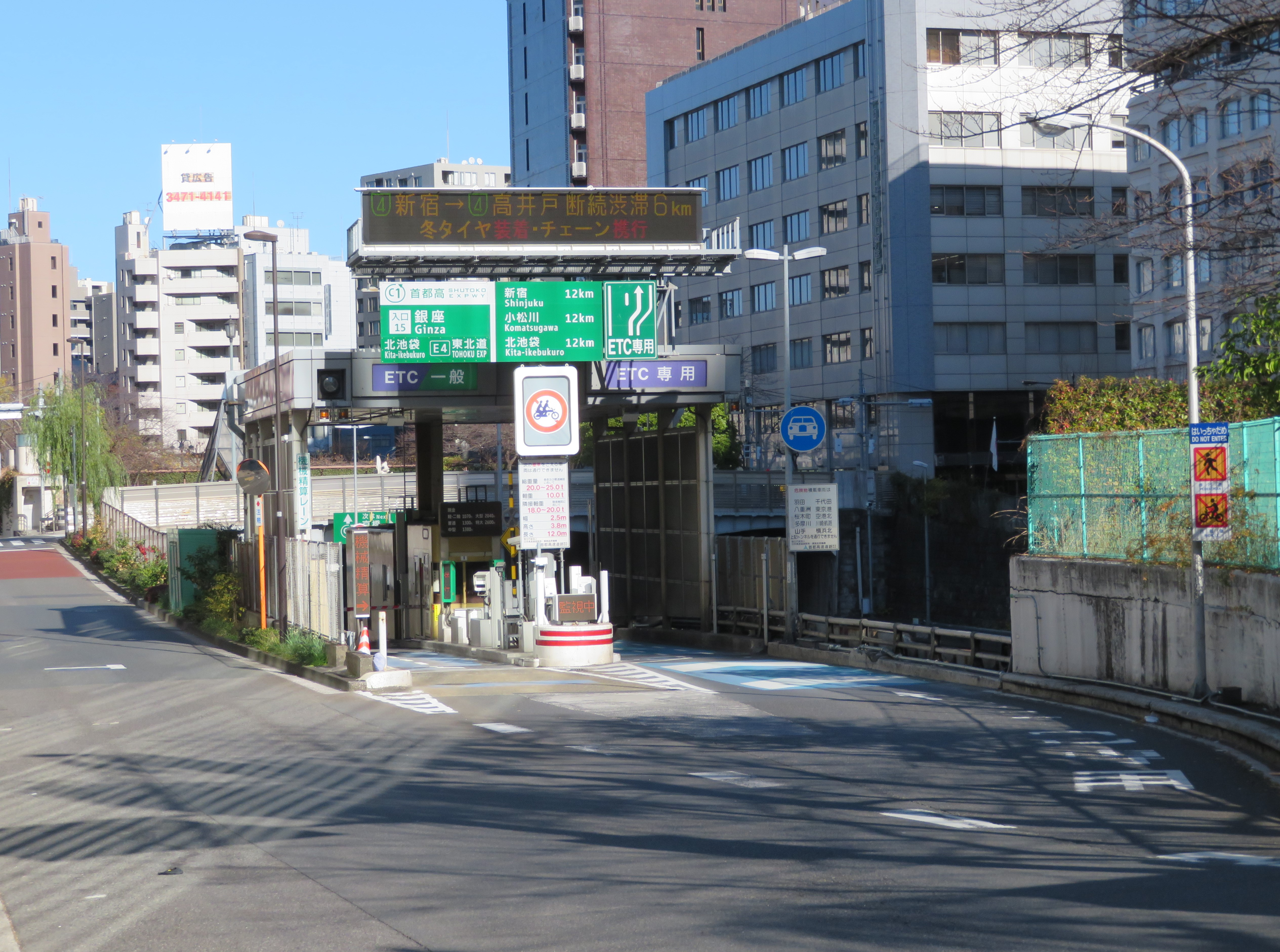 首都高速都心環状線銀座入口料金所付近 Canon PowerShot SX720 HS